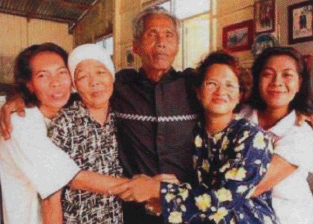 Ayah Pin bersama 4 orang isterinya